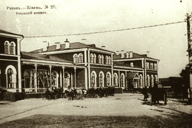 Вокзал станции Рязань. Дореволюционная открытка